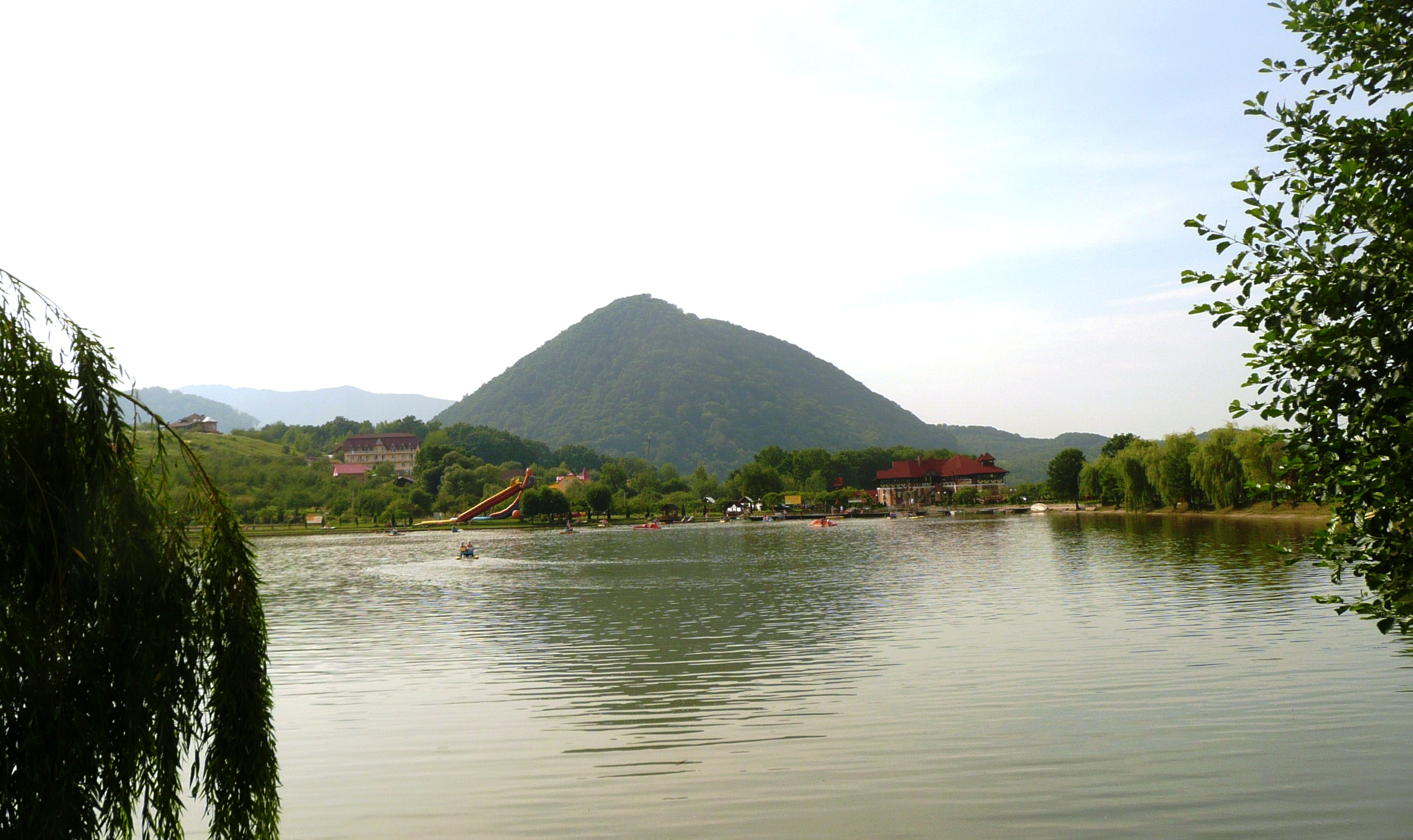 Шаянське озеро (озеро "Силоамські купальні "). Гора Шаян (435 м). Хустський район, Закарпаття.